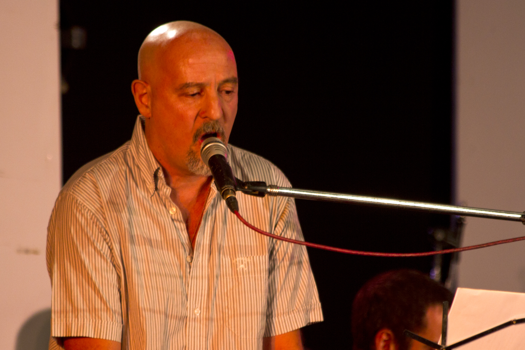 Juan Subirá en el Homenaje a Juan Carlos Cáceres en Radio Nacional